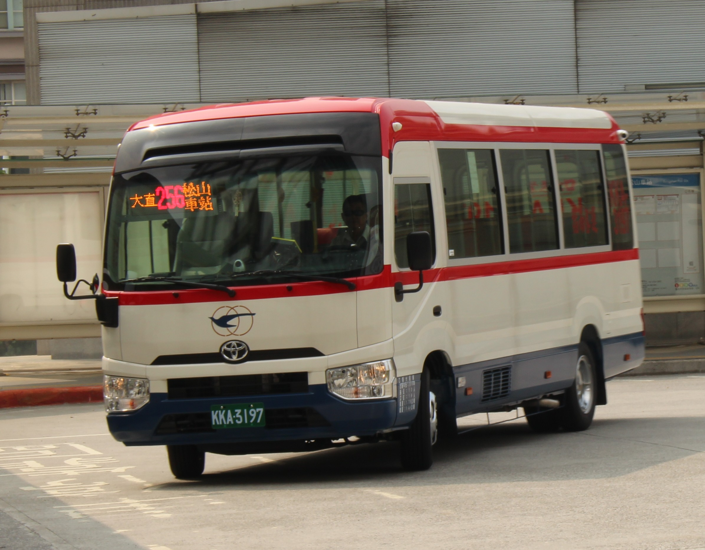 中文（台灣）: 指南客運豐田Coaster中型巴士KKA-3197，行駛臺北市聯營公車256線。